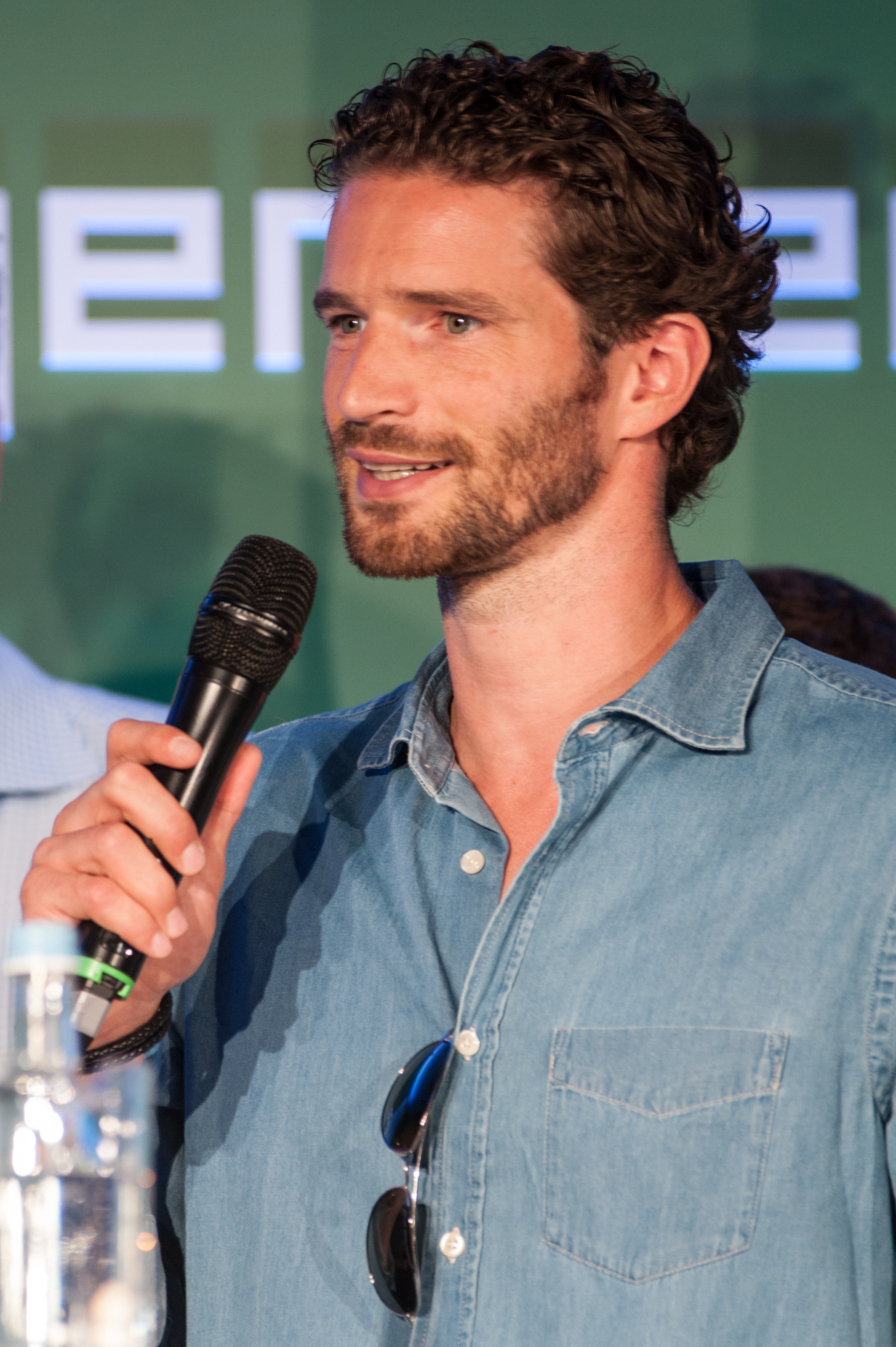 Pressekonferenz zum 10. Tag der Legenden im Hotel Le Royal Méridien